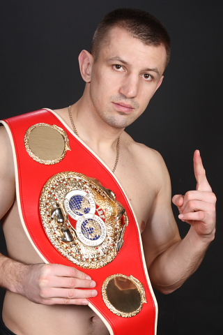 Tomasz Adamek - polski bokser, mistrz świata